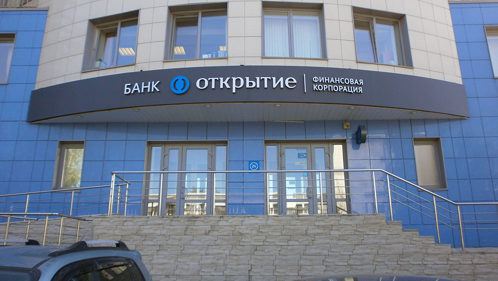 Финансовая корпорация «Открытие». Офис в городе Пермь.